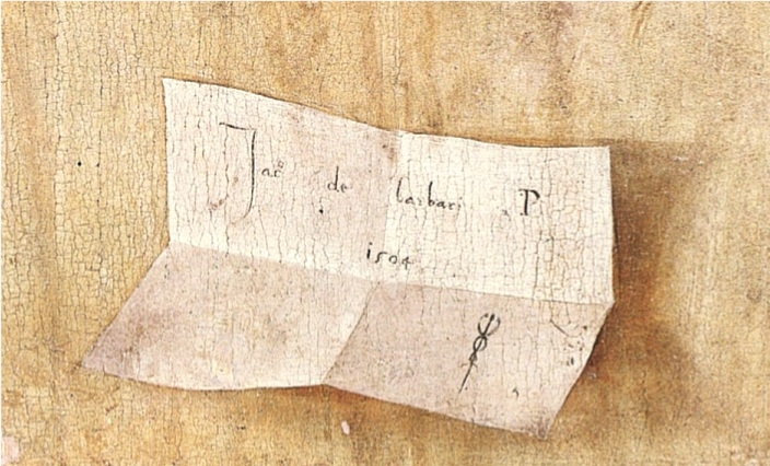 Signatur des Gemäldes Stillleben mit Rebhuhn und Eisenhandschuhen